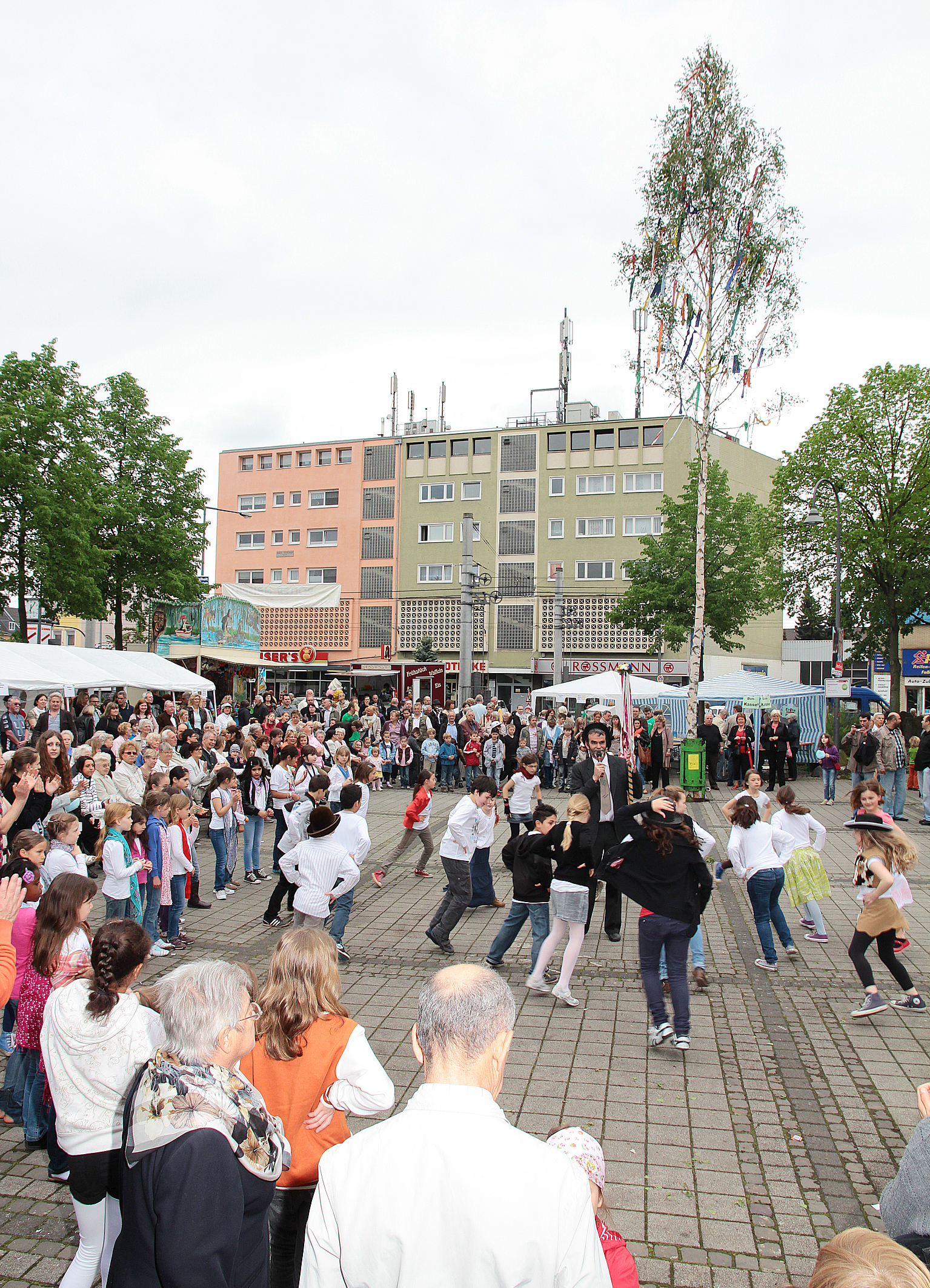 Poller Maifest 2012 auf dem Marktplatz, mit Maibaum, Kindertanzgruppe, Reihmeister des Maigeloogs